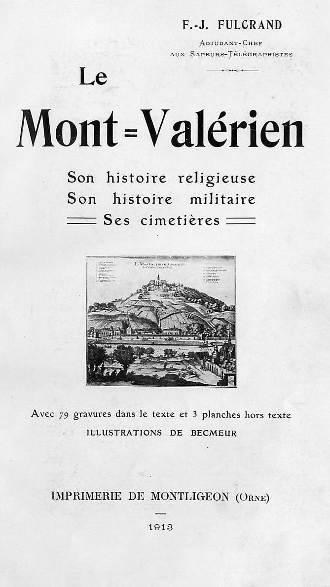 Livre sur le Mont Valérien écrit par l'ADC Fulcrand